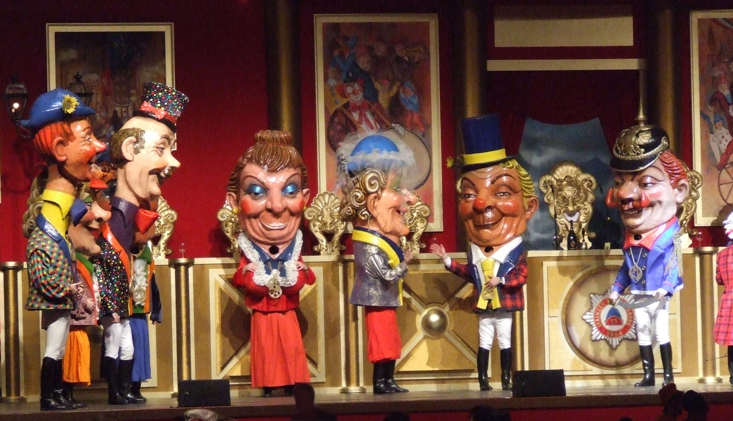 Schwellkopp bei der Mainzer Fastnacht, hier Sitzung der Mainzer Prinzengarde